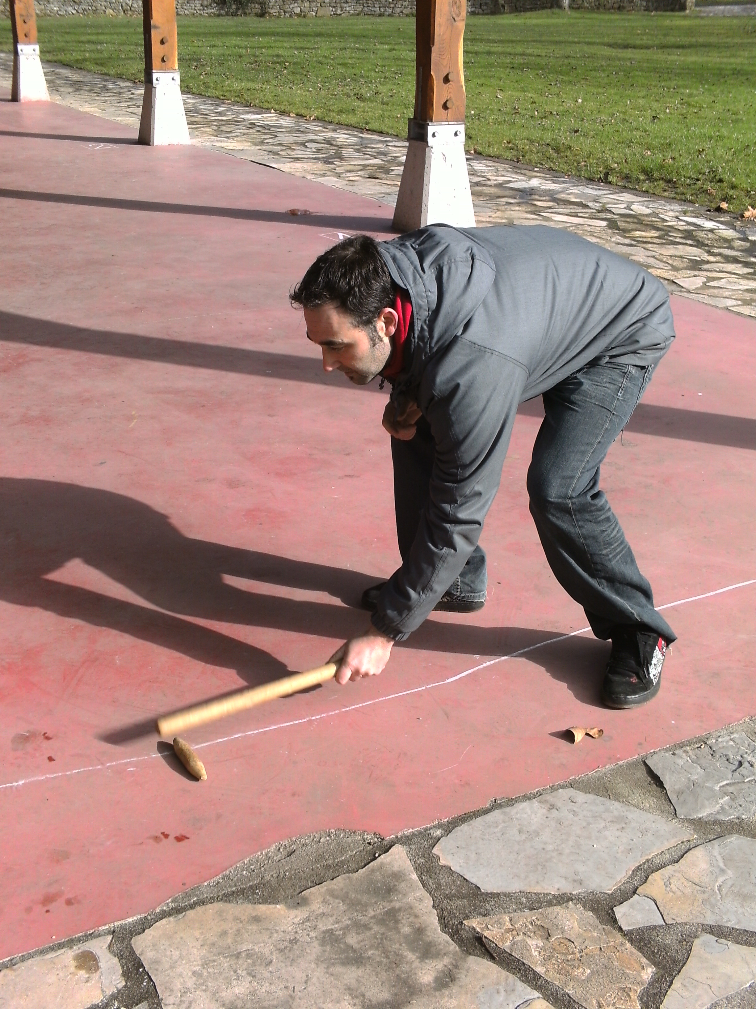 Primer güelpe, col liriu en suelu. (Dani Ordieres)